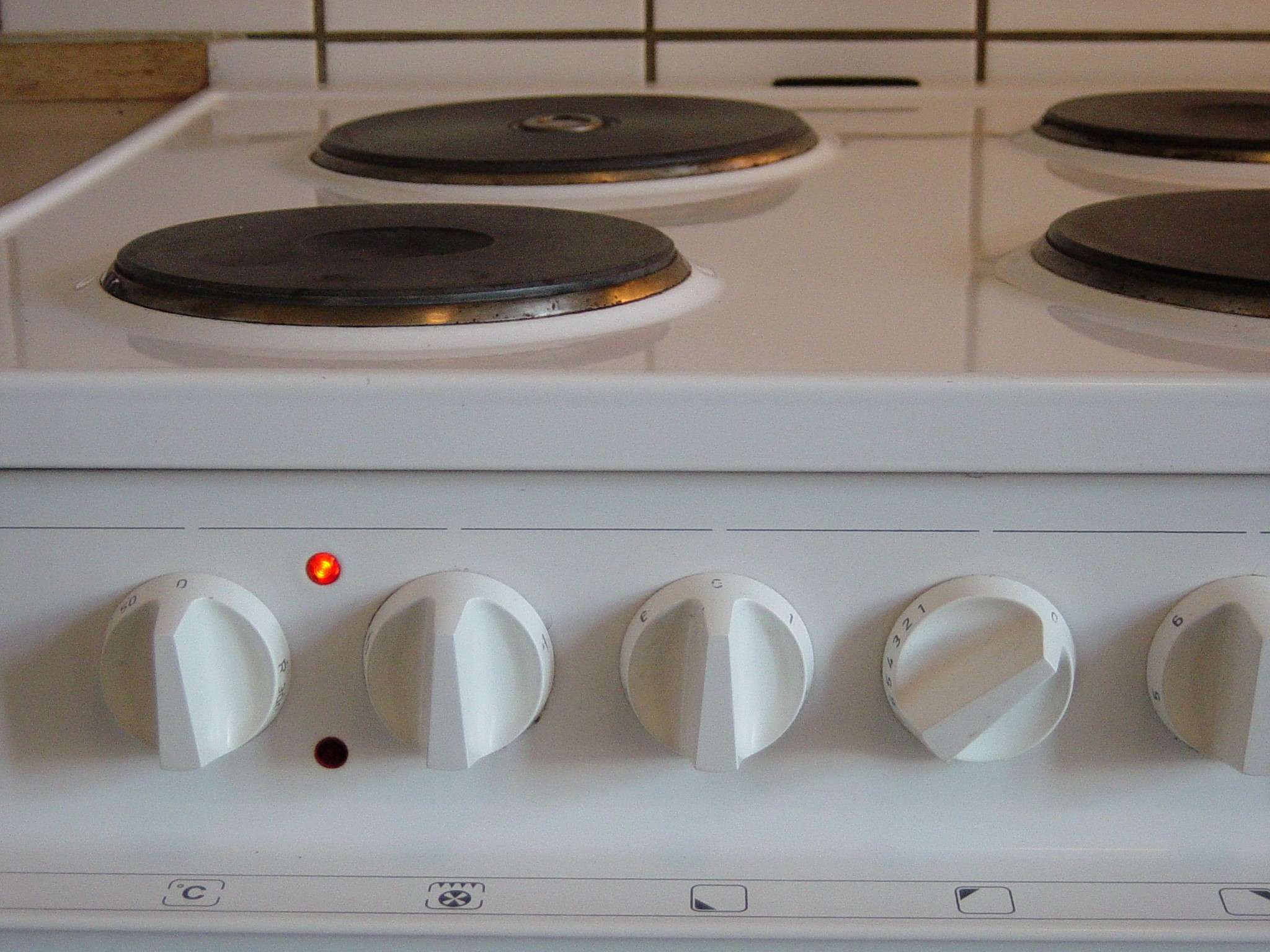 Elektroherd mit vier Kochplatten und integriertem Backofen, als Standgerät. Die Kochplatte hinten links ist als Blitzkochplatte mit höherer Heizleistung ausgebildet. Die obere Kontrollleuchte zeigt an, dass eine oder mehrere der vier Kochplatten eingeschaltet sind. Die beiden linken Drehschalter und die untere Kontrollleuchte sind für die Bedienung des Backofens eingerichtet.